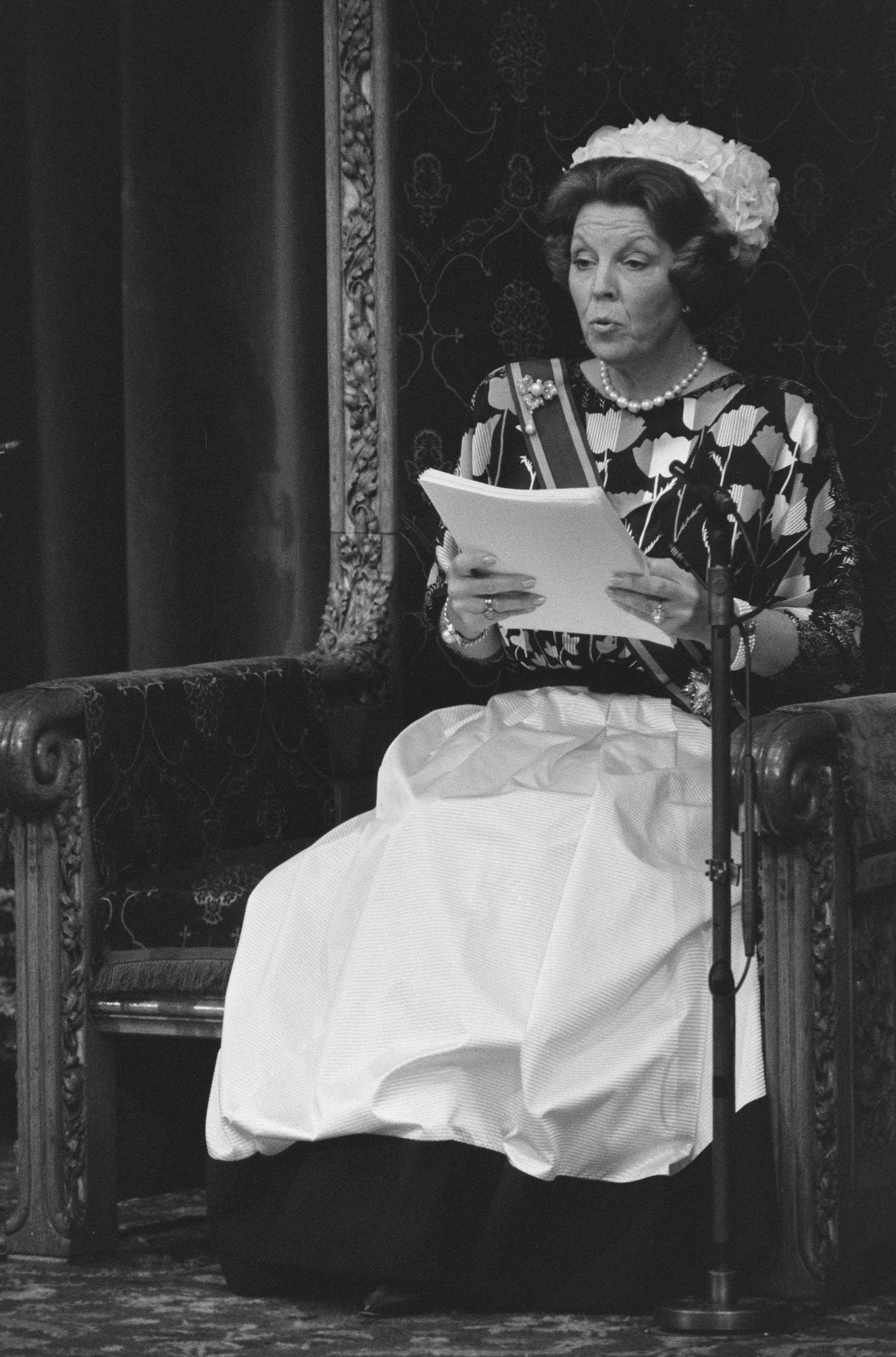 Collectie / Archief : Fotocollectie Anefo Reportage / Serie : Prinsjesdag 1987 Beschrijving : Koningin Beatrix tijdens het uitspreken van de troonrede Datum : 15 september 1987 Locatie : Den Haag, Zuid-Holland Trefwoorden : Prinsjesdag, koninginnen, troonredes Persoonsnaam : Beatrix, koningin Fotograaf : Bogaerts, Rob / Anefo Auteursrechthebbende : Nationaal Archief Materiaalsoort : Negatief (zwart/wit) Nummer archiefinventaris : bekijk toegang 2.24.01.05 Bestanddeelnummer : 934-0762